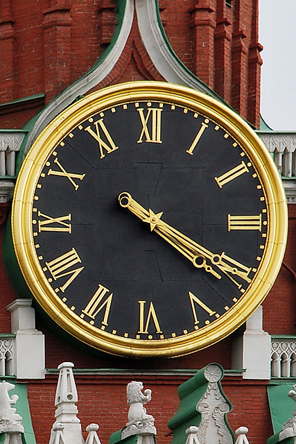 Московский кремль. Куранты.